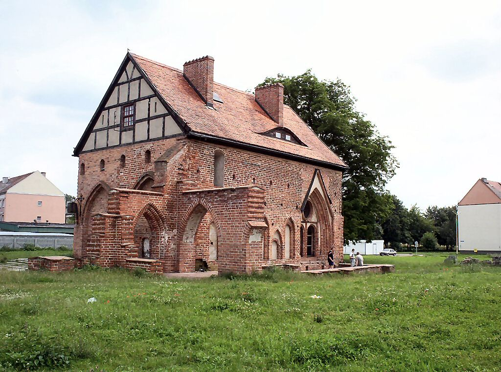 Kołbacz - dom opata